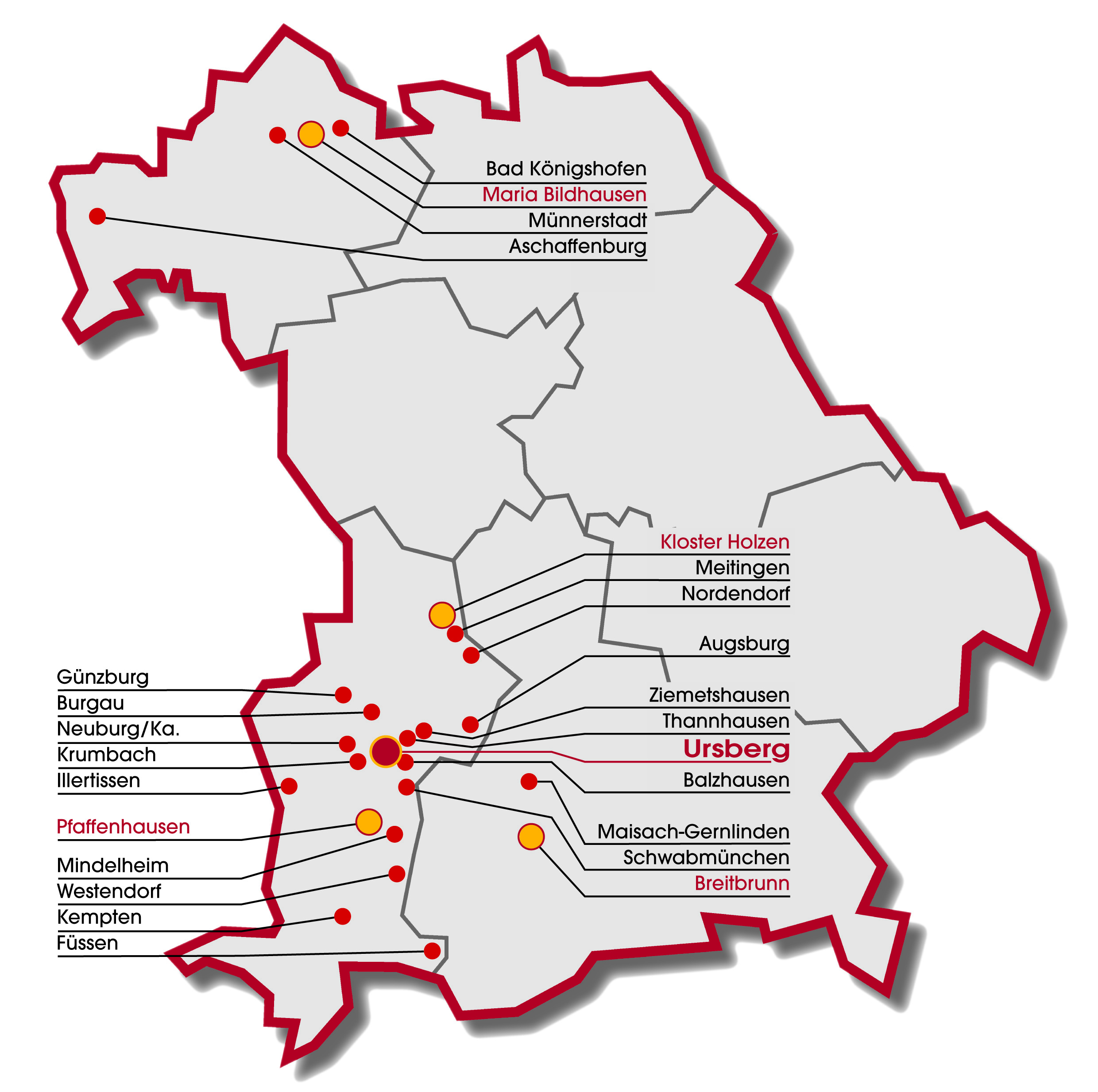 Angebotsorte des Dominikus-Ringeisen-Werks (Stand 05/2013)